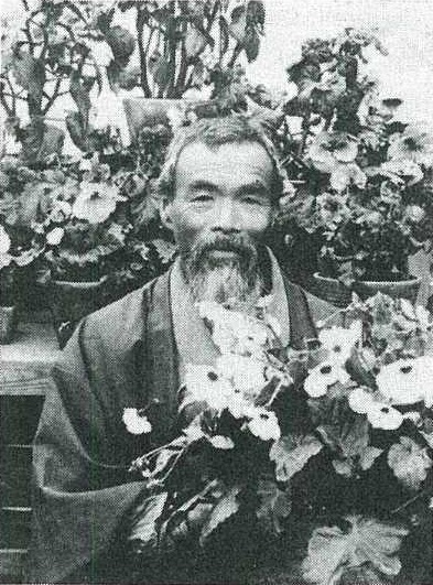 上島正 「東区今昔」札幌市東区役所総務部総務課、1979